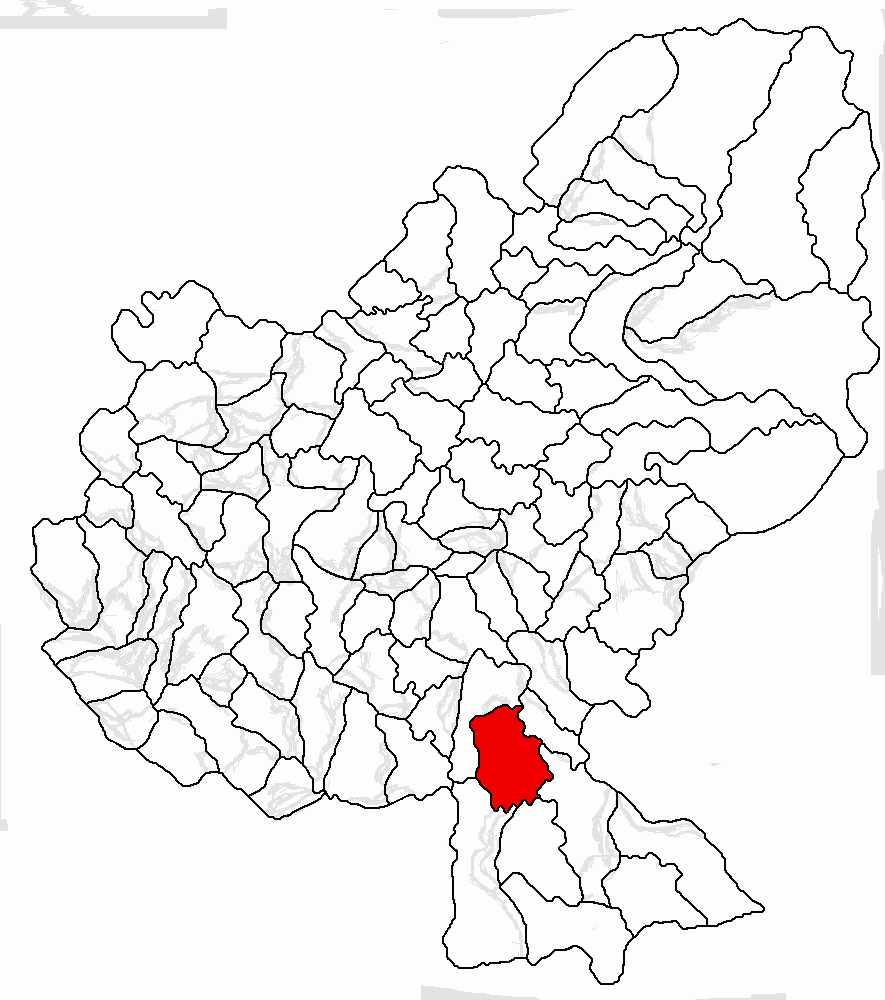 Categorie:Hărţi ale judeţului Mureş